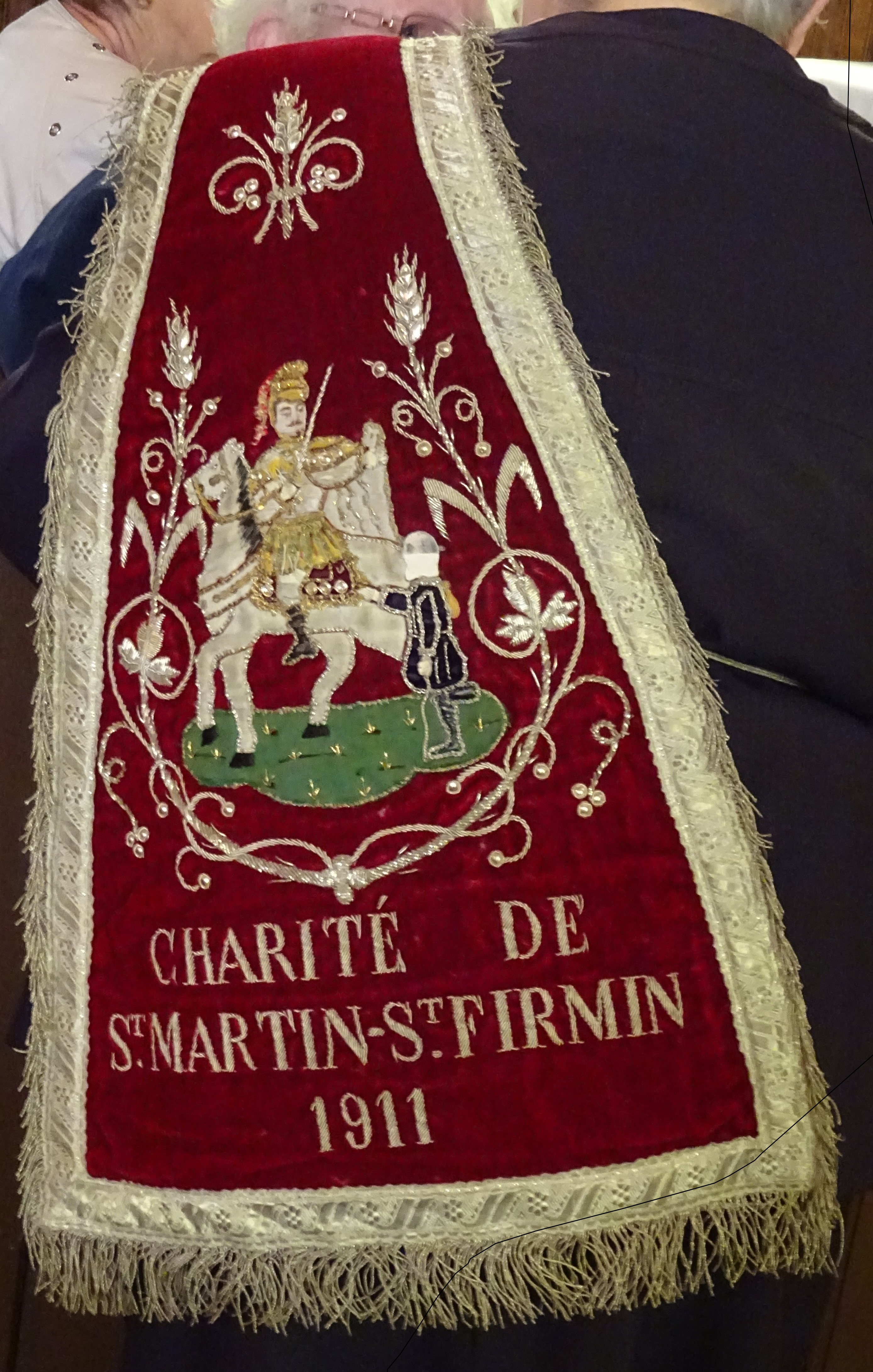 Chaperon de frère de Charité (St Martin-St Firmin, Eure, France)